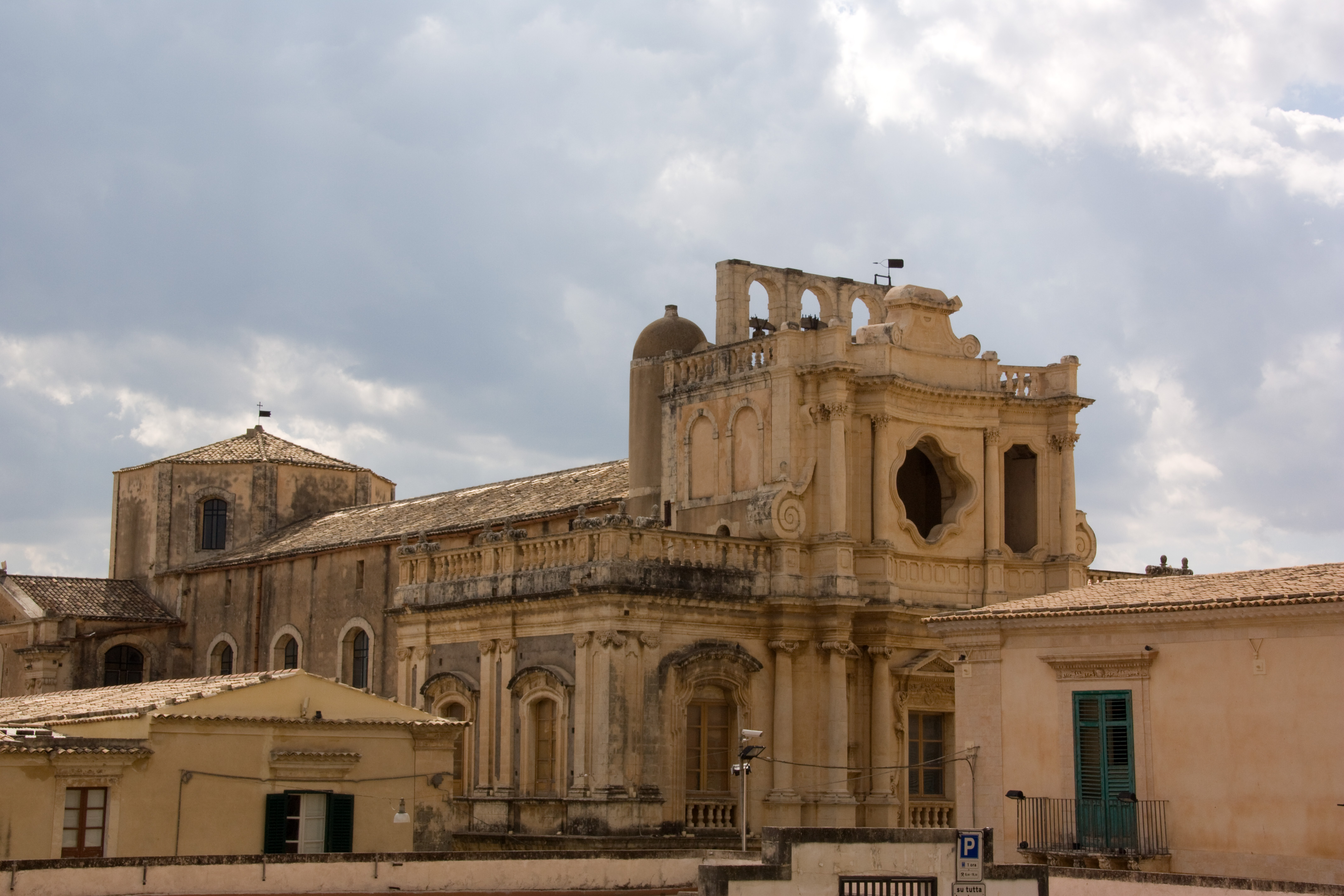 Chiesa di San Carlo Borromeo, Noto, Sicile, Italie.